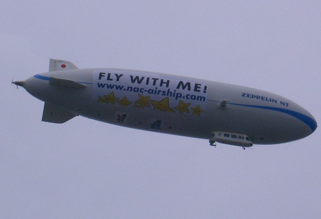 飛行船Zeppelin NT